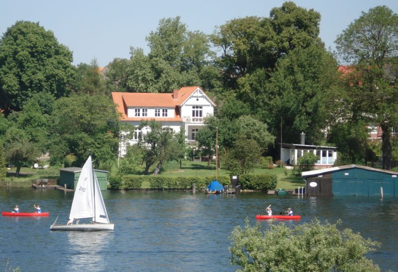 Malchower See in Malchow